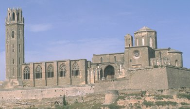 Catedral Seu Vella de Lleida en España.